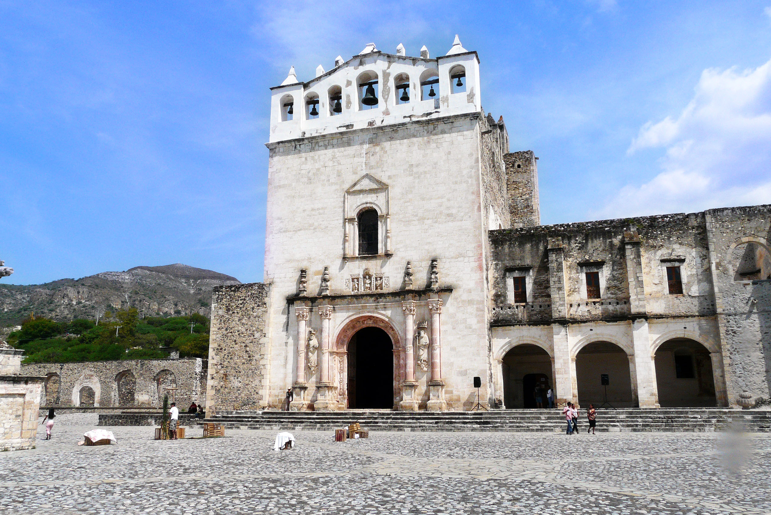 Metztitlán, Hidalgo México